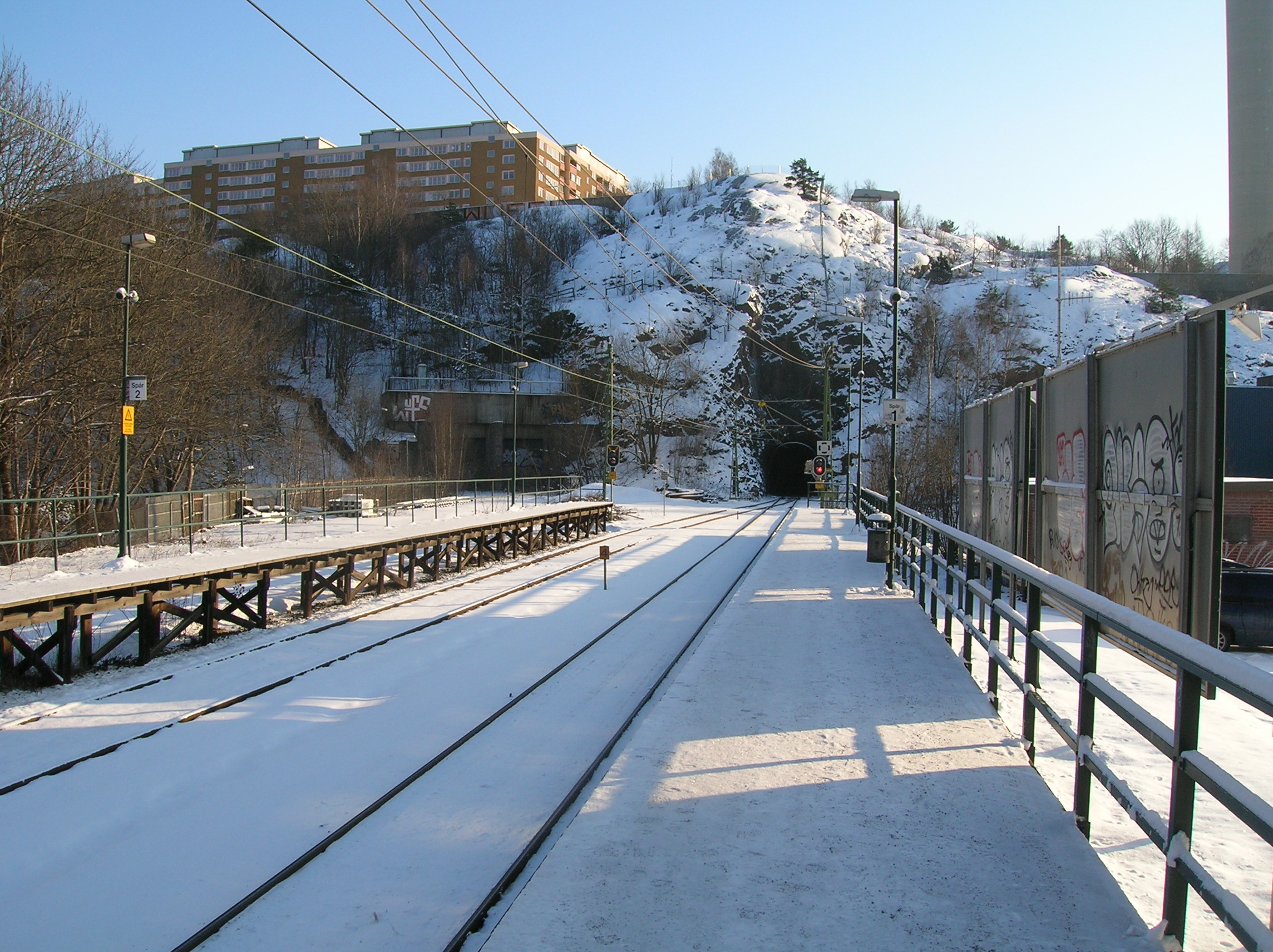 Järnvägstunneln Henriksdalstunneln genom Henriksdalsberget, Stockholm och Nacka kommuner